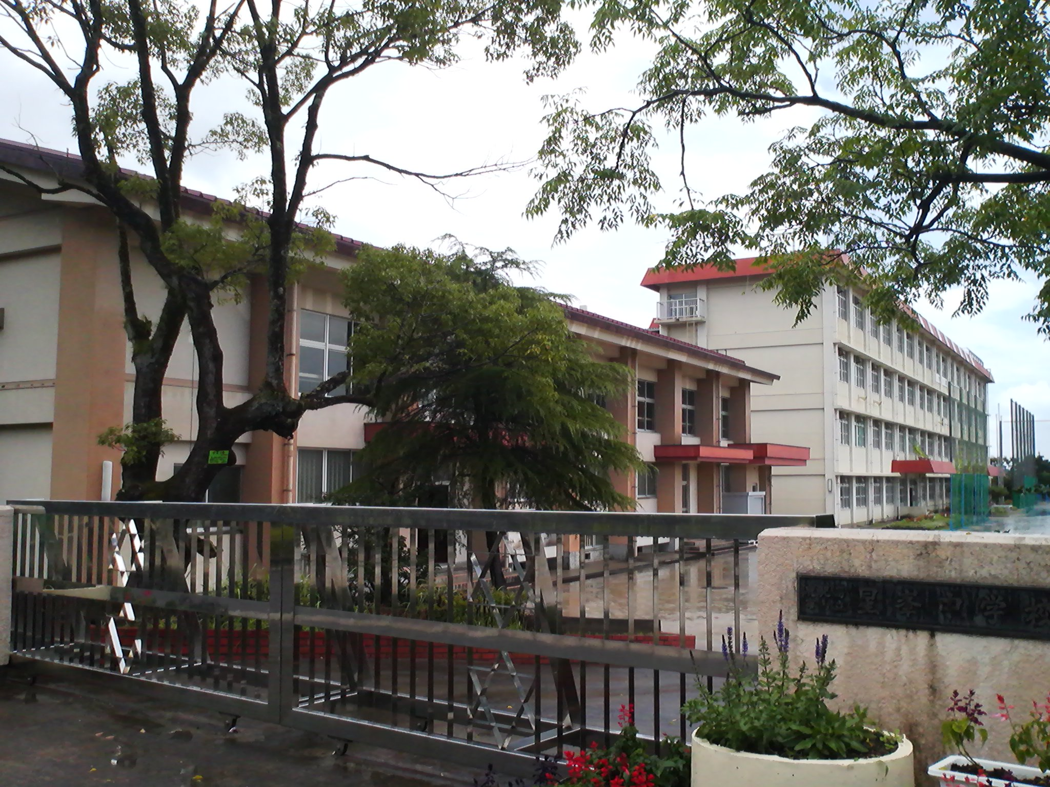 鹿児島市立星峯中学校の外観。